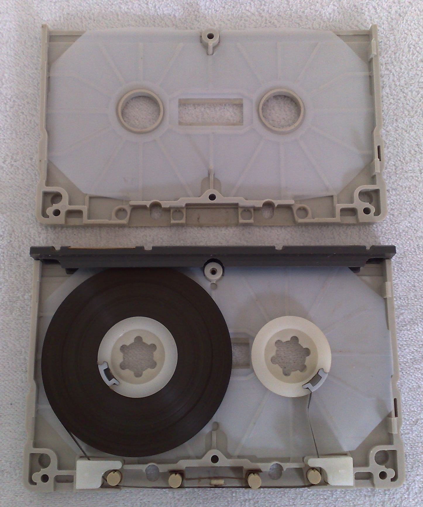 Aufbau einer Kassette nach dem System DC-International